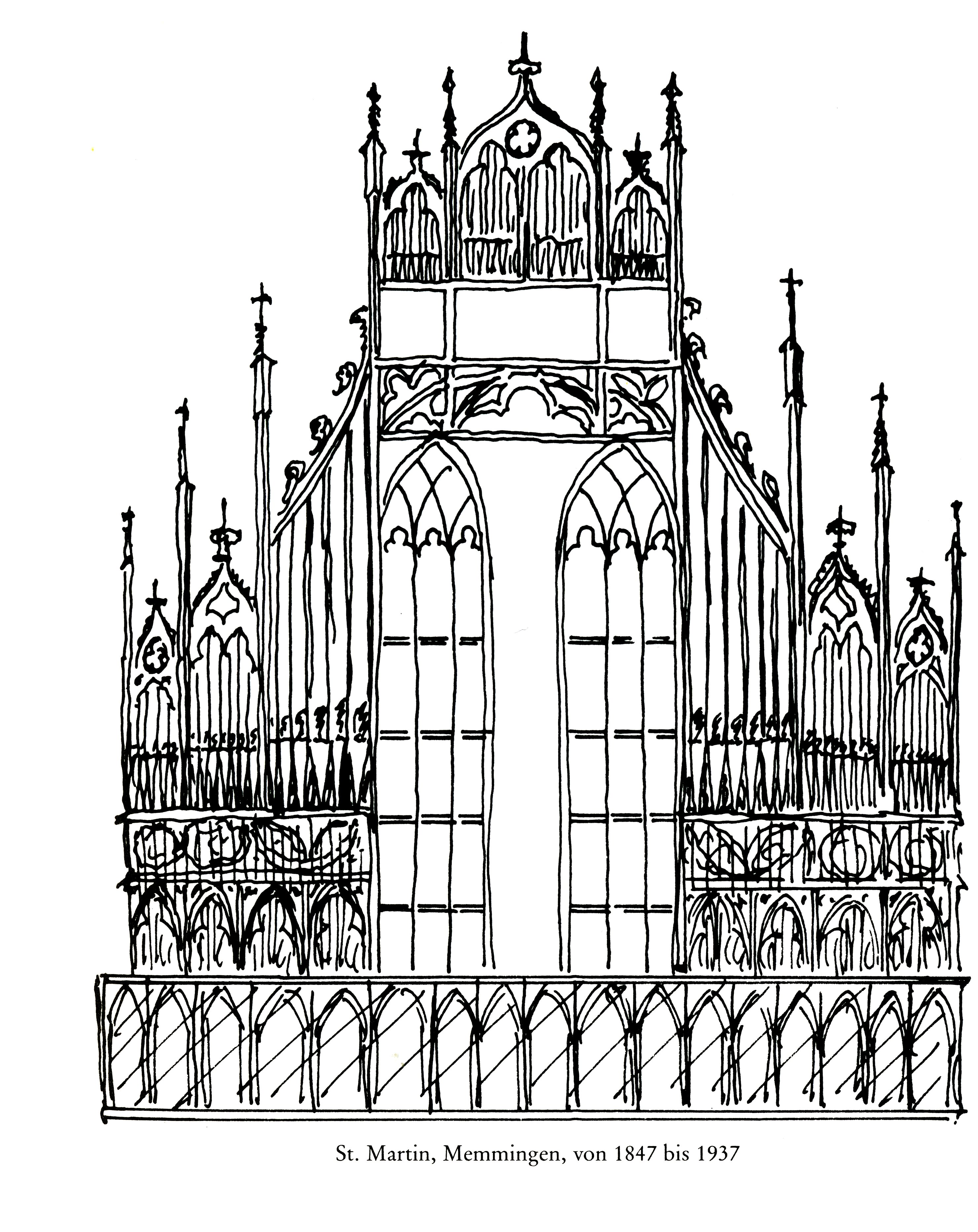 Rekonstruktion der Orgel von 1847-1937 in St. Martin zu Memmingen